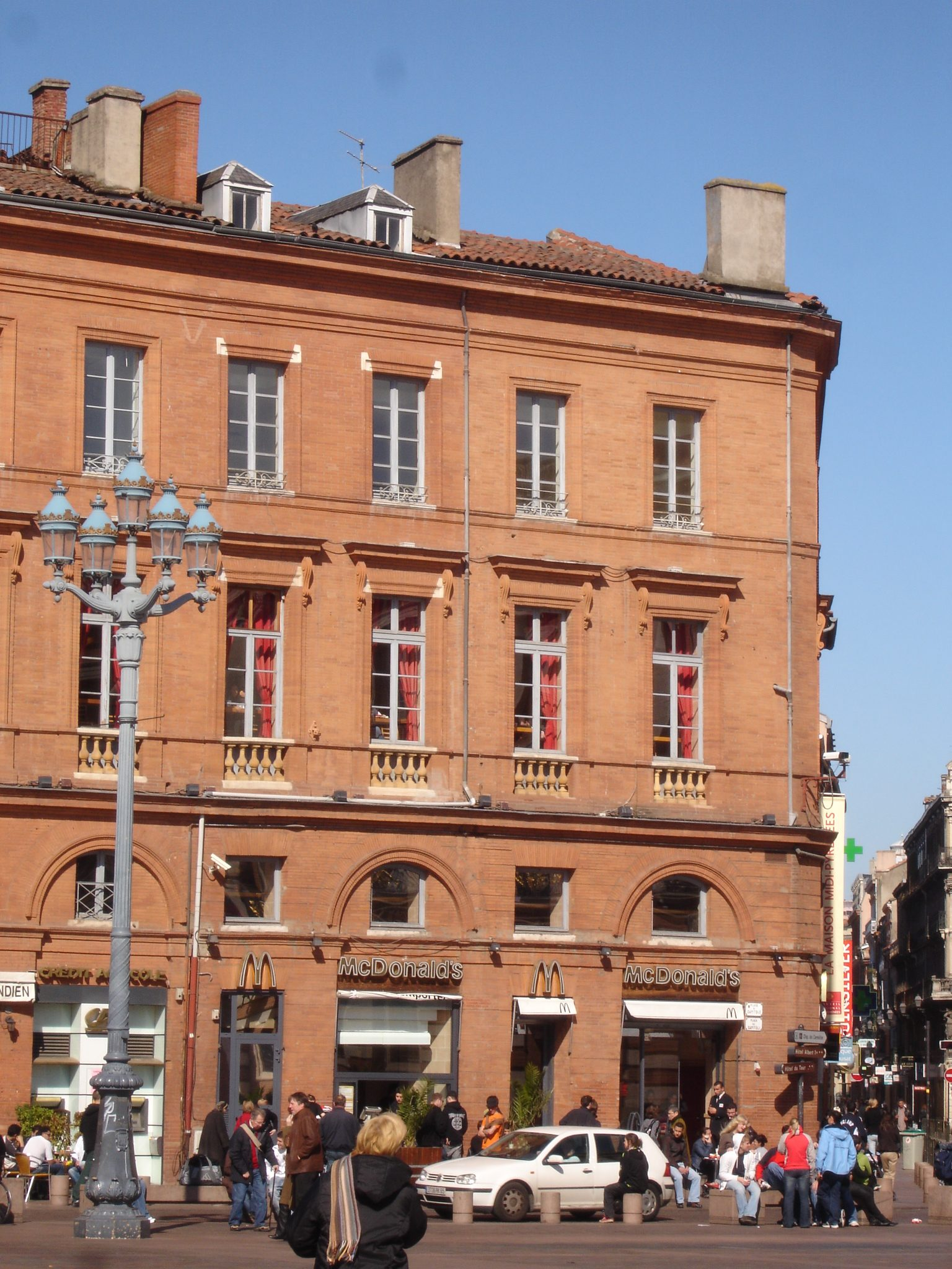 McDo du Capitole à Toulouse.